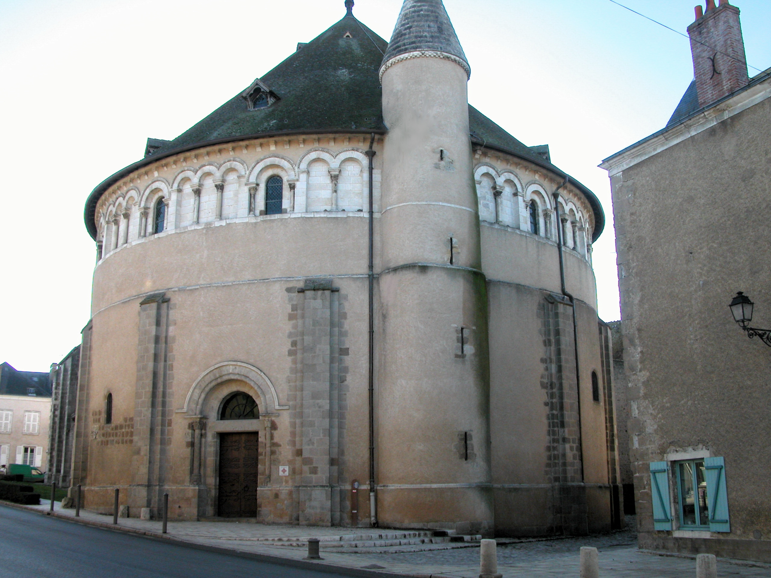 Neuvy-Saint-Sépulchre - Collégiale Saint-Etienne